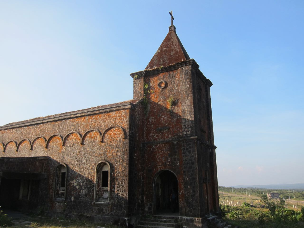 L'église catholique de 1928